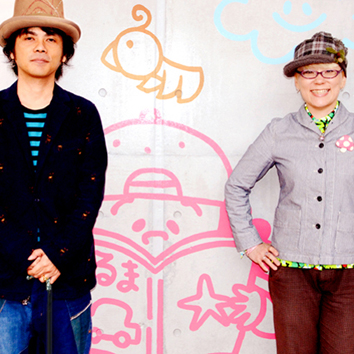 ATORON